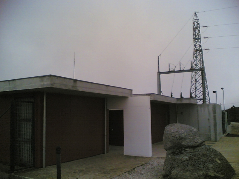 Subestação de um parque eólico, neste caso do Barroso (Próximo de Salto e Cabeceiras de Basto), Portugal